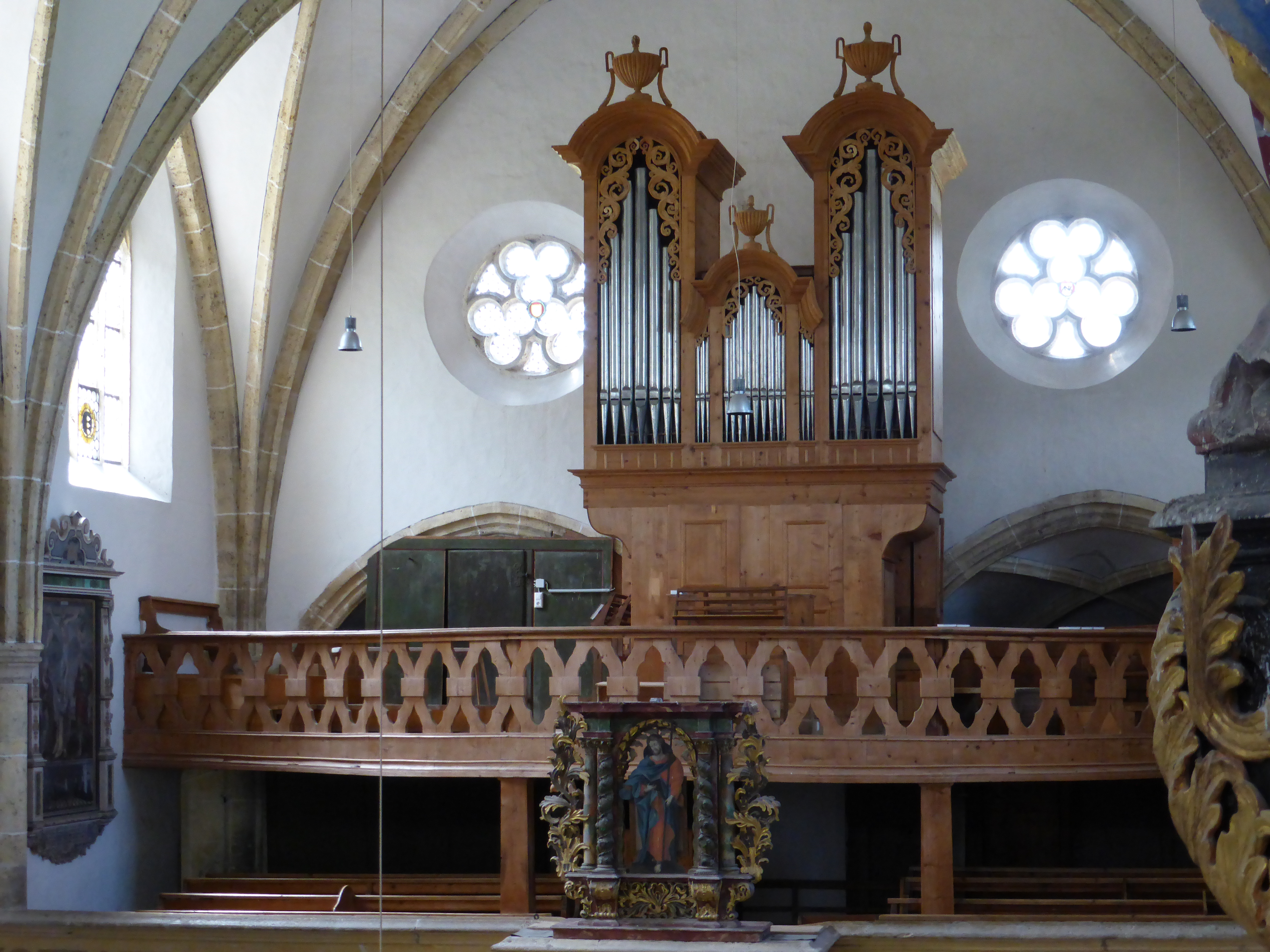 Dummel Orgel von 1837 in St. Leonhard ob Tamswet